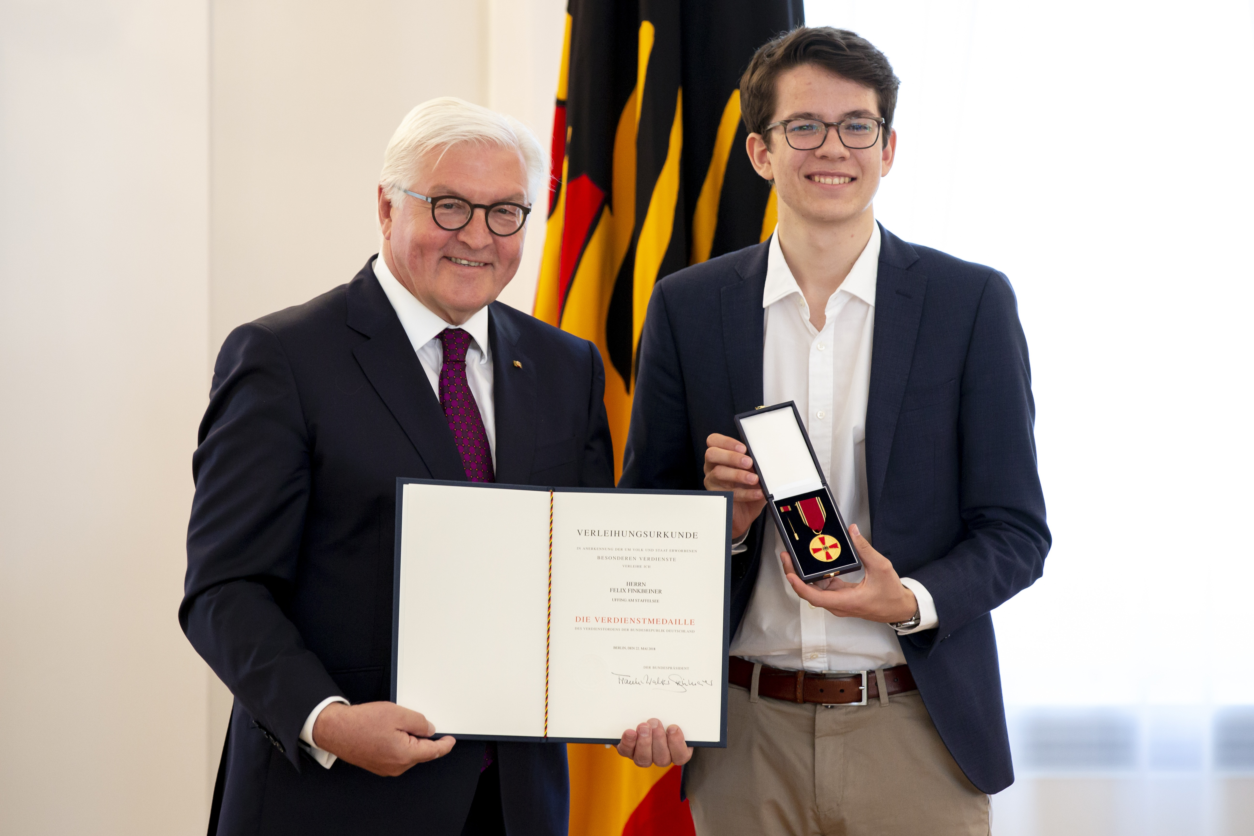 Felix Finkbeiner bekommt Bundesverdienstkreuz von Bundespräsident Steinmeier